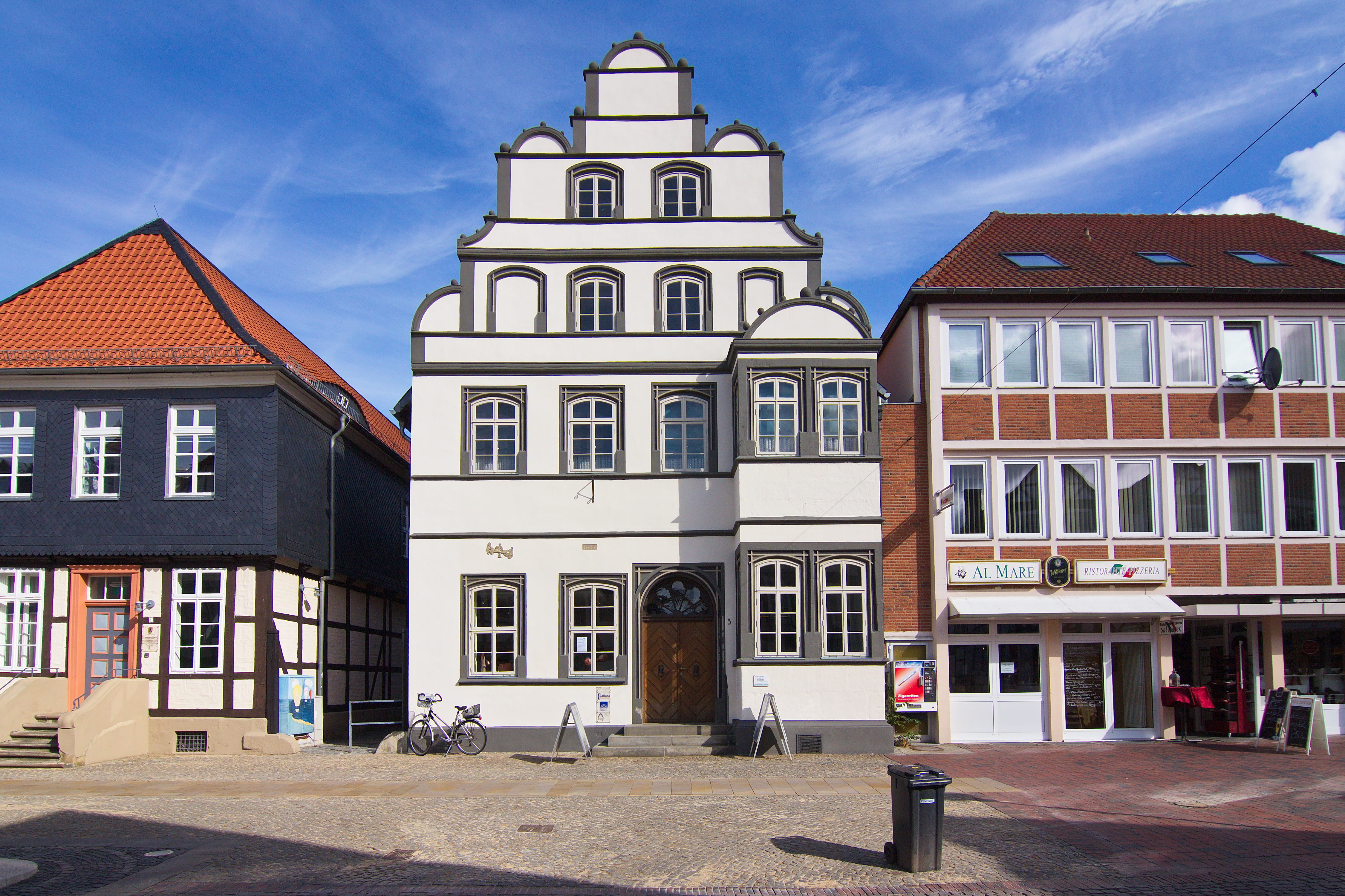 Das 1546 unter Herzog Franz (1539–1549) errichtete Kavaliershaus als Fachwerkbau mit Steinfront gilt neben dem Schloss als wichtigster Profanbau Gifhorns.